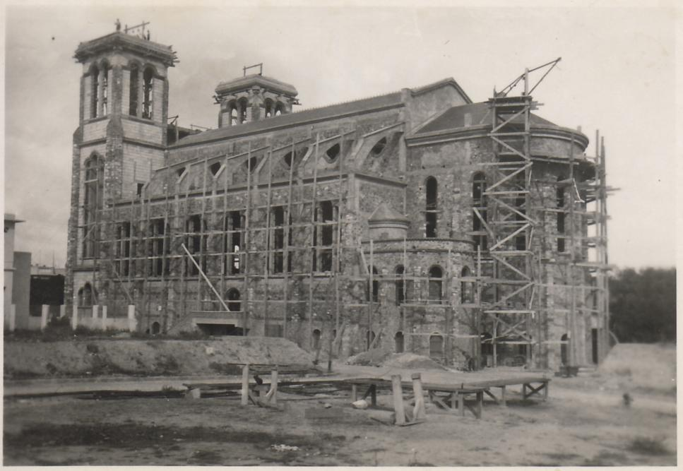 Aïn Témouchent, Algérie. 1936: église en construction.